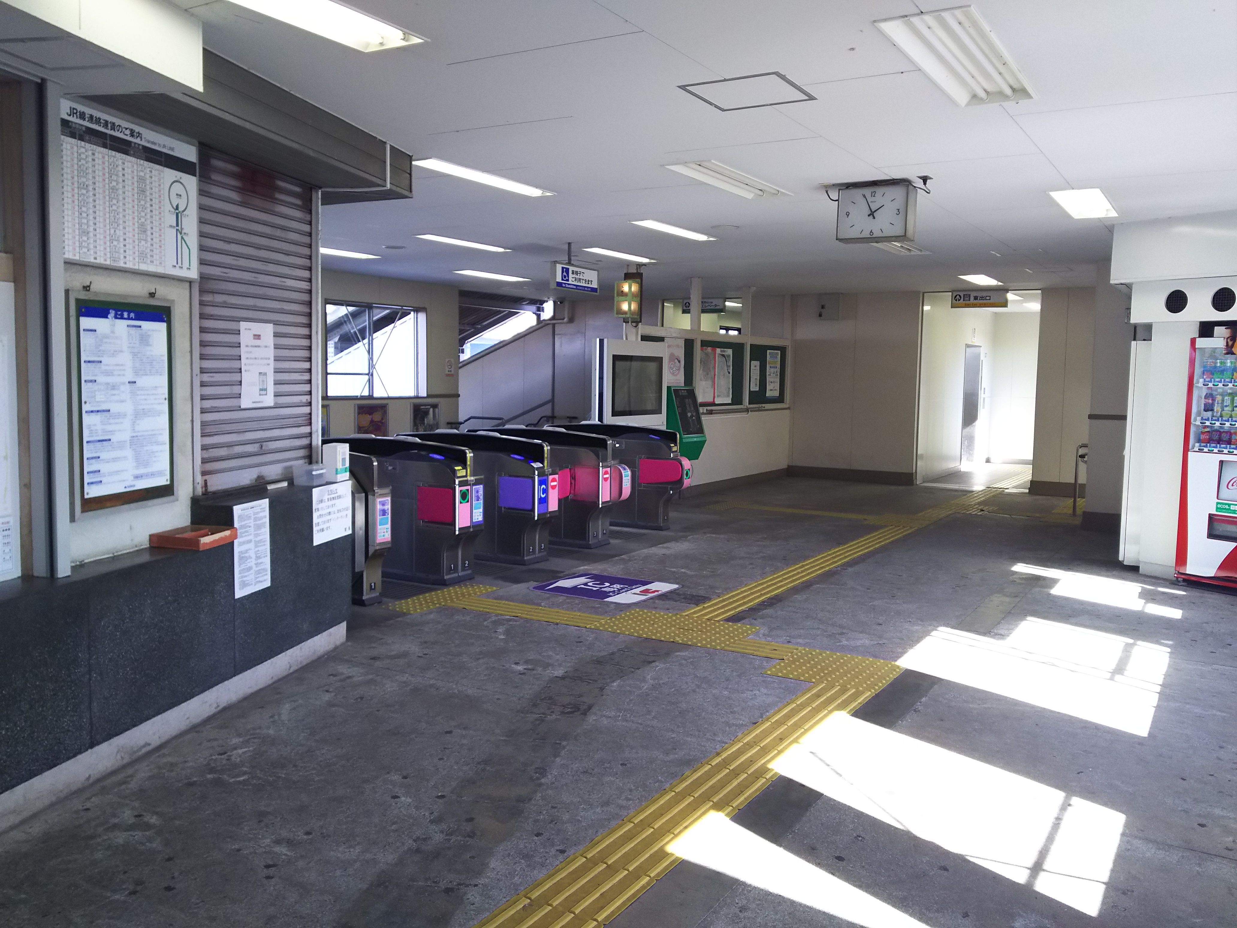 南海高野線浅香山駅改札口（大阪府堺市）